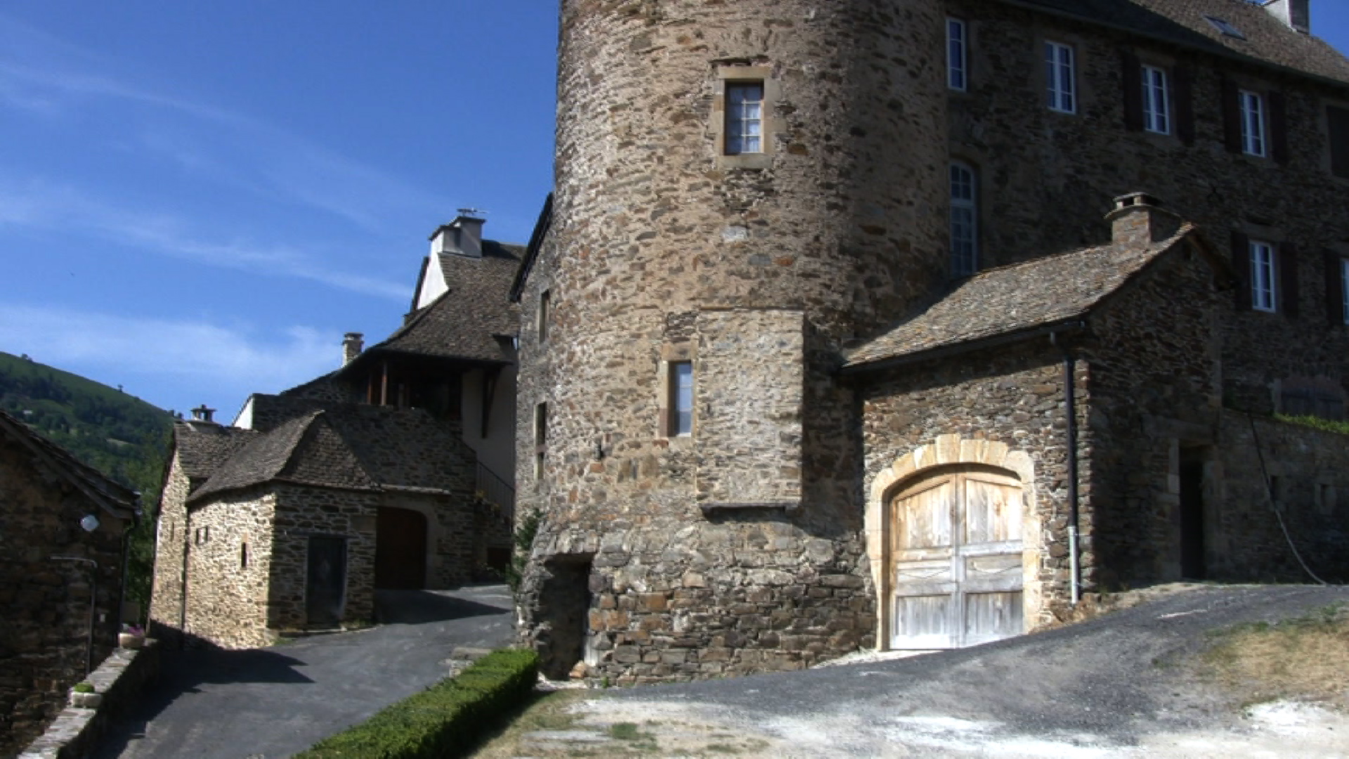 Entrée du château (Pomayrols-Aveyron-France)